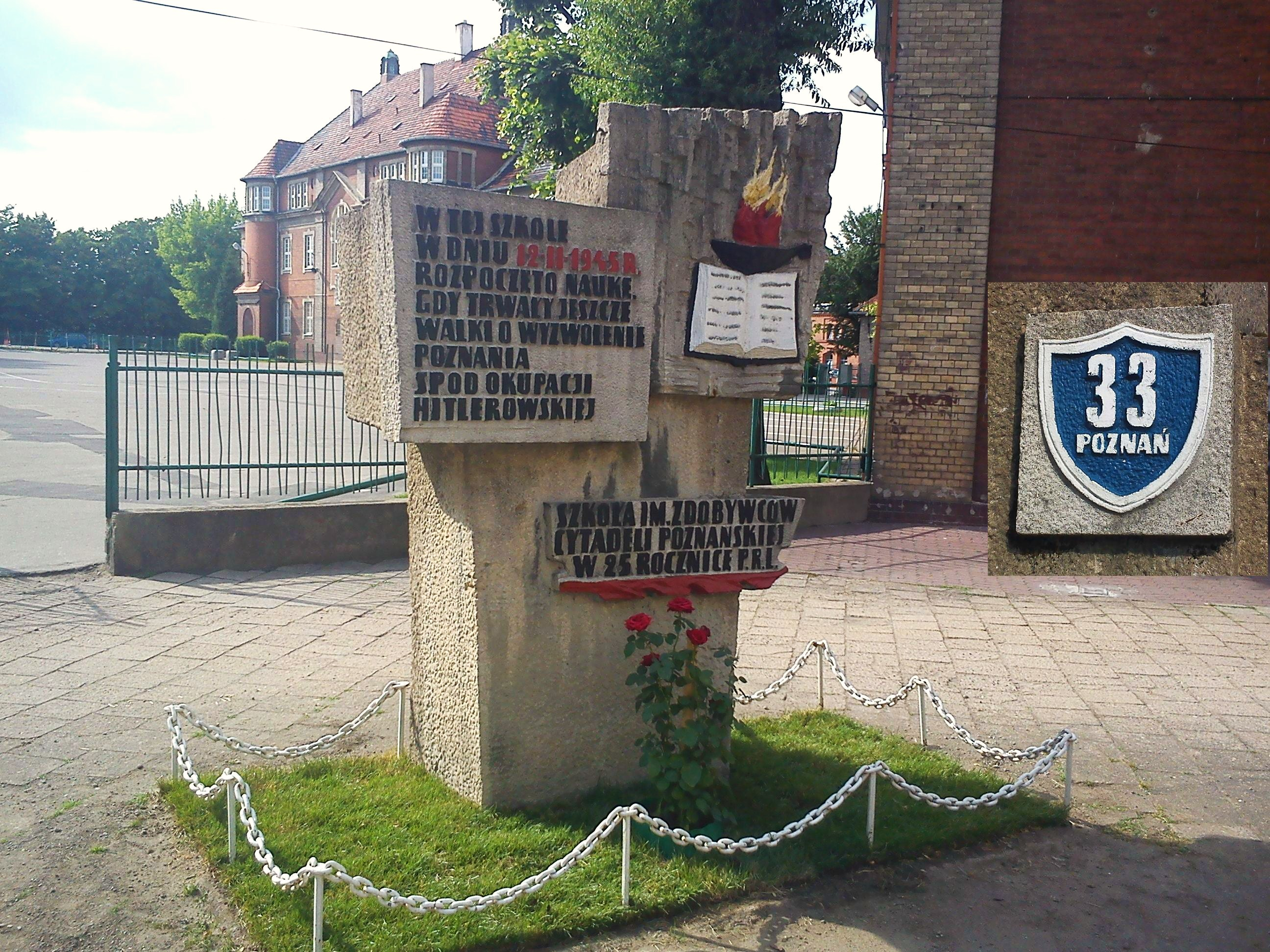 Poznań Łazarz - zespół zabudowań szkolnych, pomnik (zabytek nr A 258).